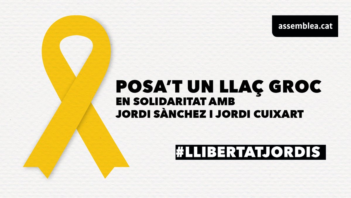 Imatge de difusió de la campanya del llaç groc de l'Assemblea Nacional Catalana.